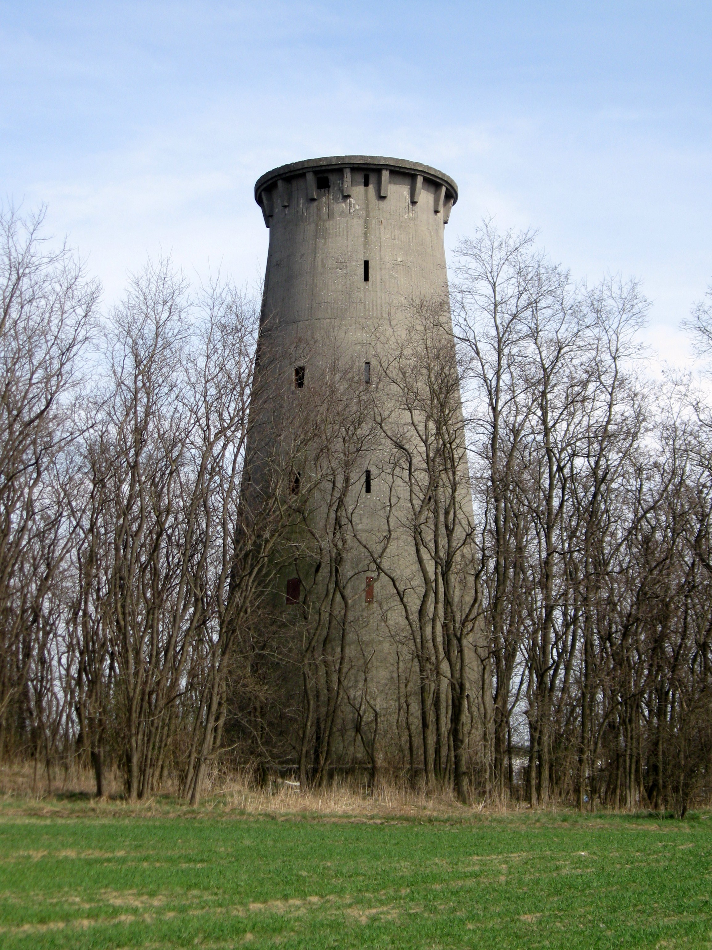 Ruine des Radarturms in Weesow, Stadt Werneuchen, Brandenburg, Deutschland